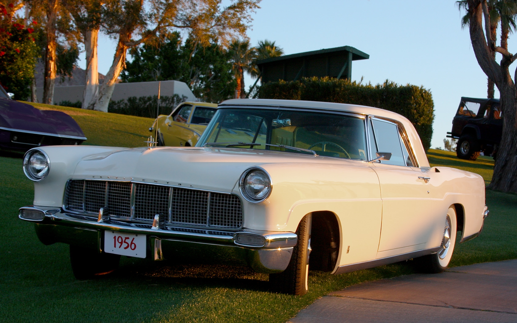 2011 Desert Classic, La Quinta, CA